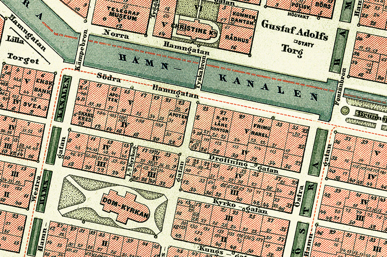 Bilden visar kvarteret Kommerserådet i stadsdelen Inom Vallgraven i Göteborg år 1888. Kvarteret syns i mitten av kartan, söder om Stora Hamnkanalen, och omges av Västra Hamngatan, Södra Hamngatan, Drottninggatan och Korsgatan. I kvarteret ligger Chalmerska huset.